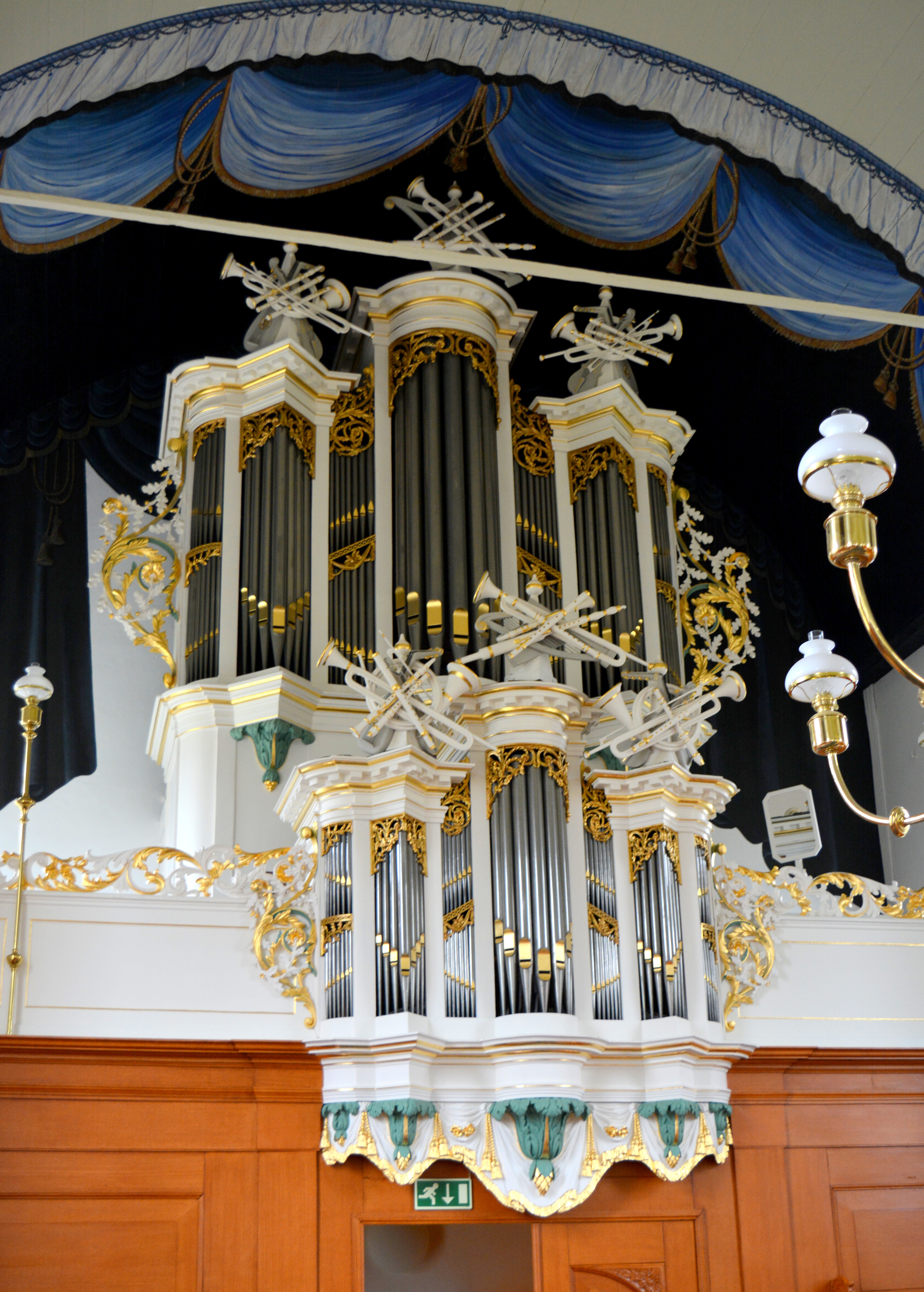 Laurentiuskerk, Raerd, orgel